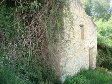 Antiguo Lavadero Púlico en el municipio de Sot de Chera (Valencia, España). Está situado junto a una fuente con su mismo nombre.